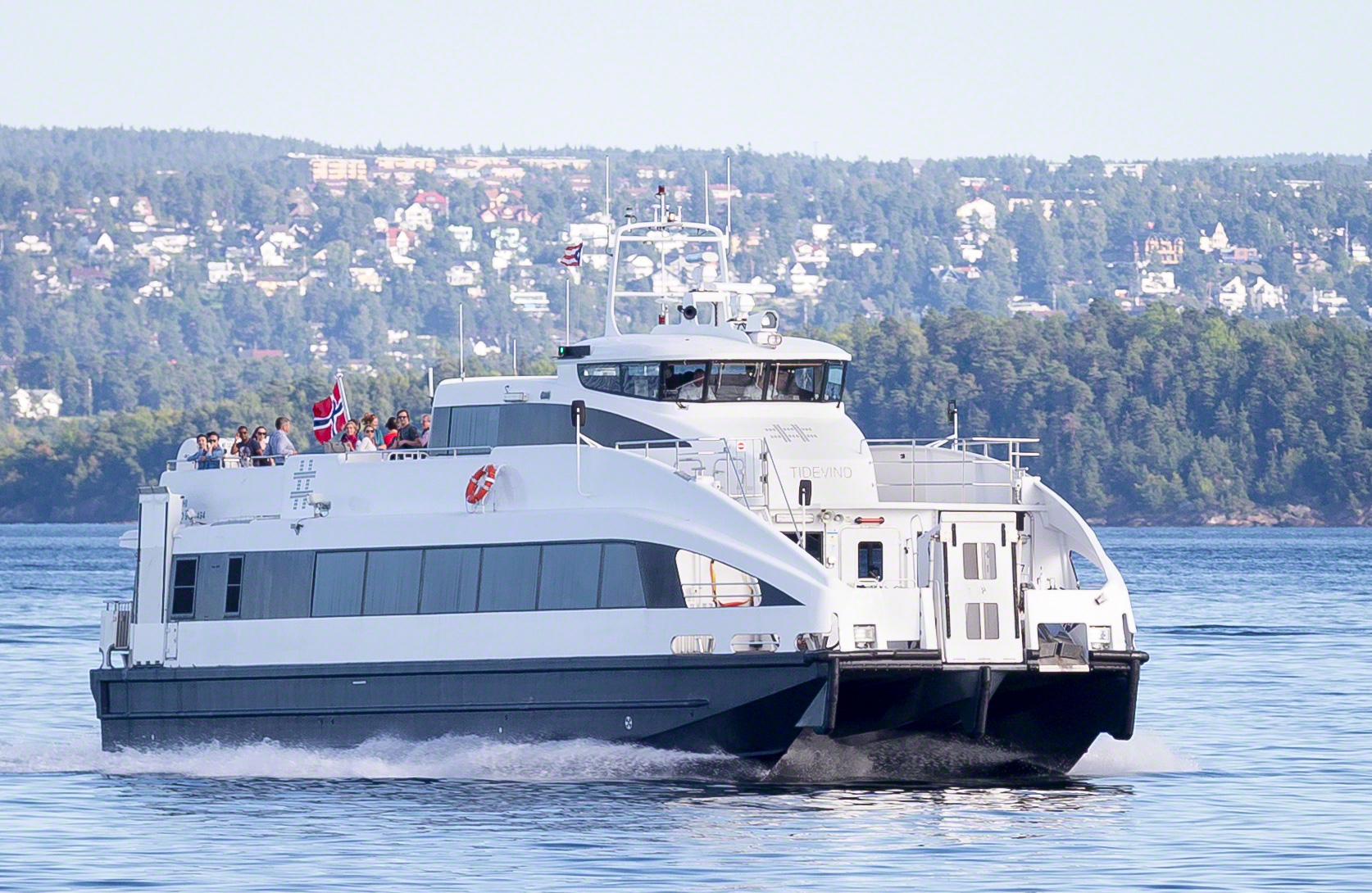 MS "Tidevind" i rute mellom Aker Brygge og Fornebu. Høsten 2016.